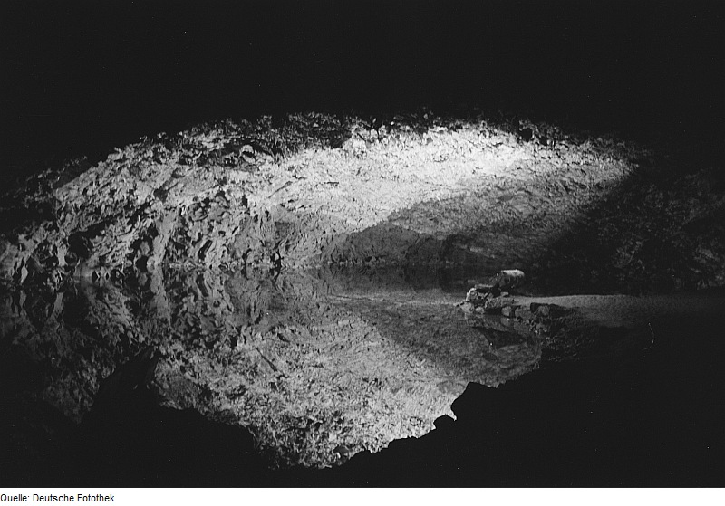 Original image description from the Deutsche Fotothek Grottensee in der Barbarossahöhle